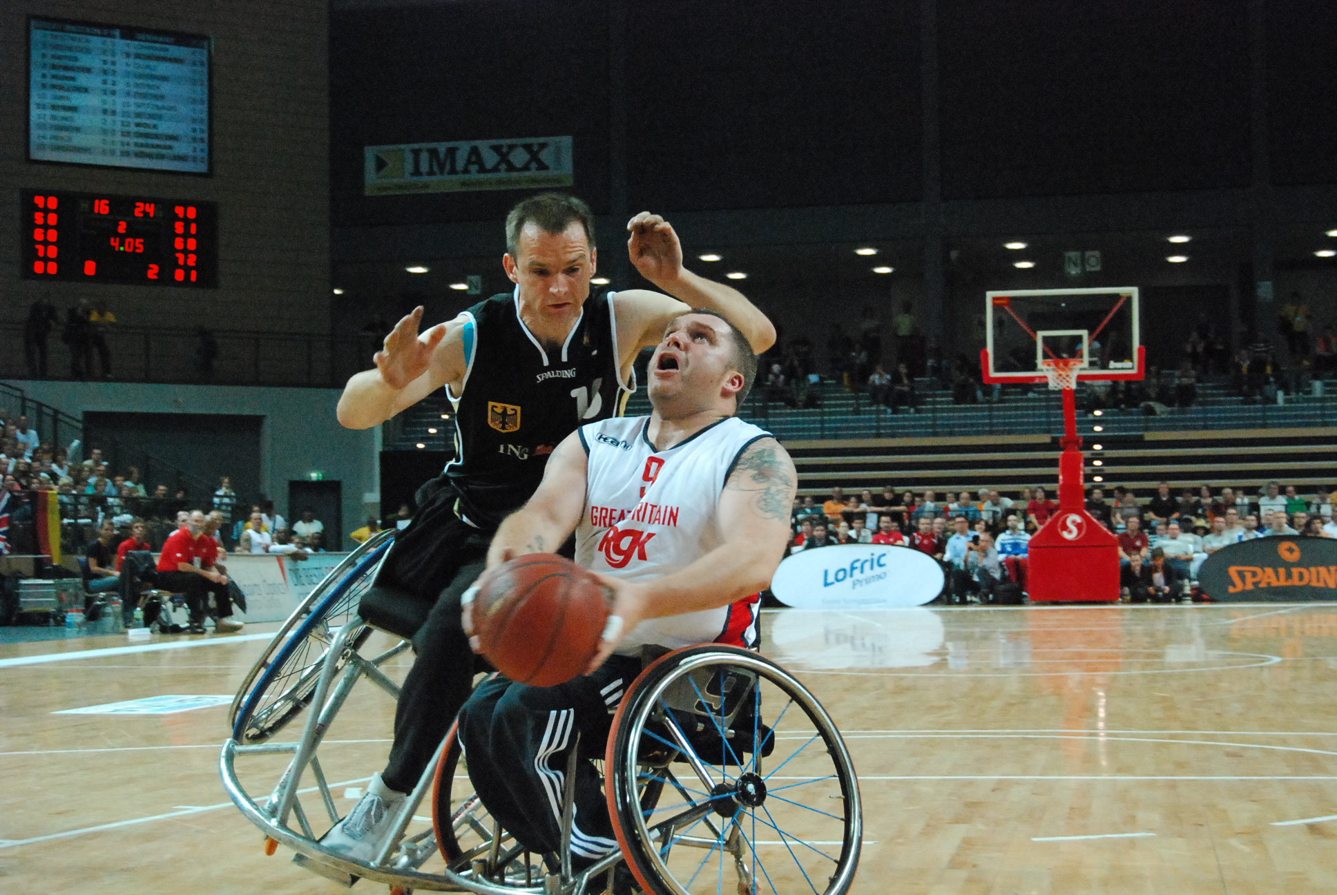 Halbfinale der Rollstuhlbasketball-Eurobameisterschaften 2007 in Wetzlar. Grossbritannien gegen Deutschland. Dirk Köhler-Lenz (Deutschland, 15) versucht Jon Pollock (Grossbritannien, 9) am Korbwurf zu hindern.